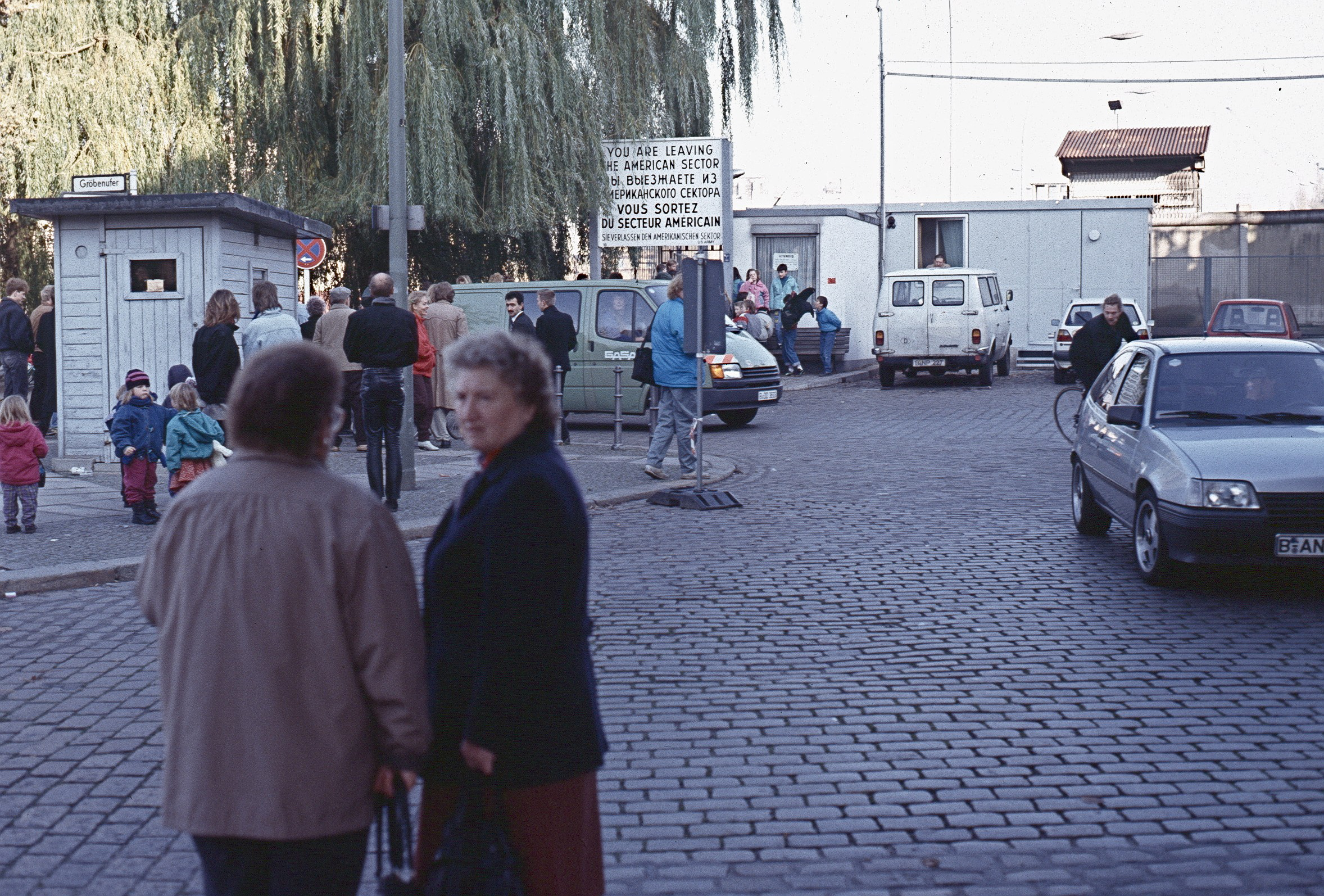 Grenzübergang Oberbaumbrücke